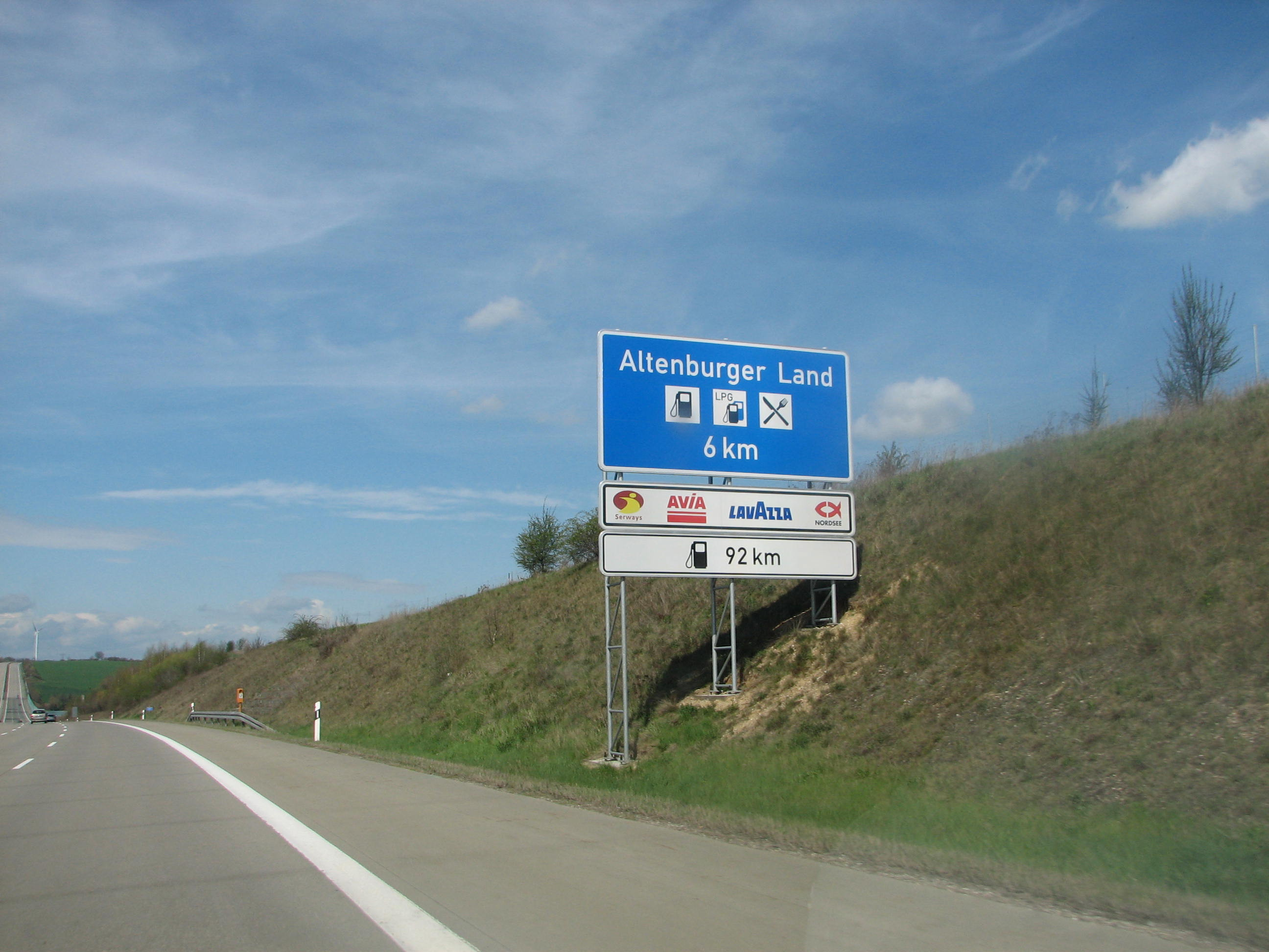 Hinweisschild auf die Autobahnraststätte "Altenburger Land" an der Bundesautobahn 4 Chemnitz Richtung Erfurt. Der Abzweig ist in sechs Kilometern.